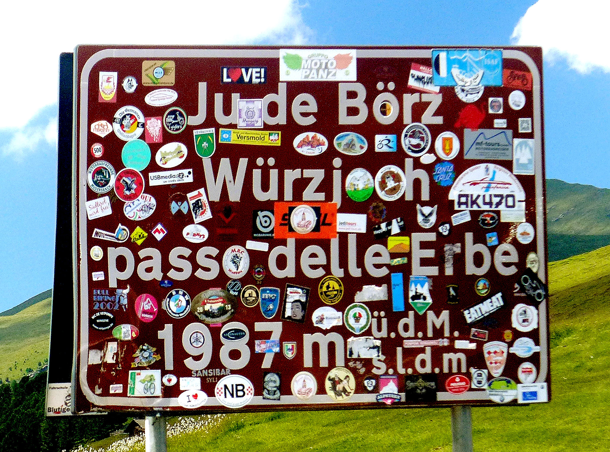 Würzjoch, az olaszországi Dél-Tirol egyik magashegyi közúti hágója